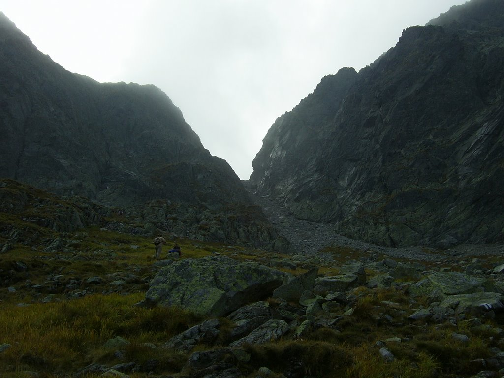 Podejście na Zawrat z Doliny Gąsienicowej